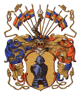 Vaakuna